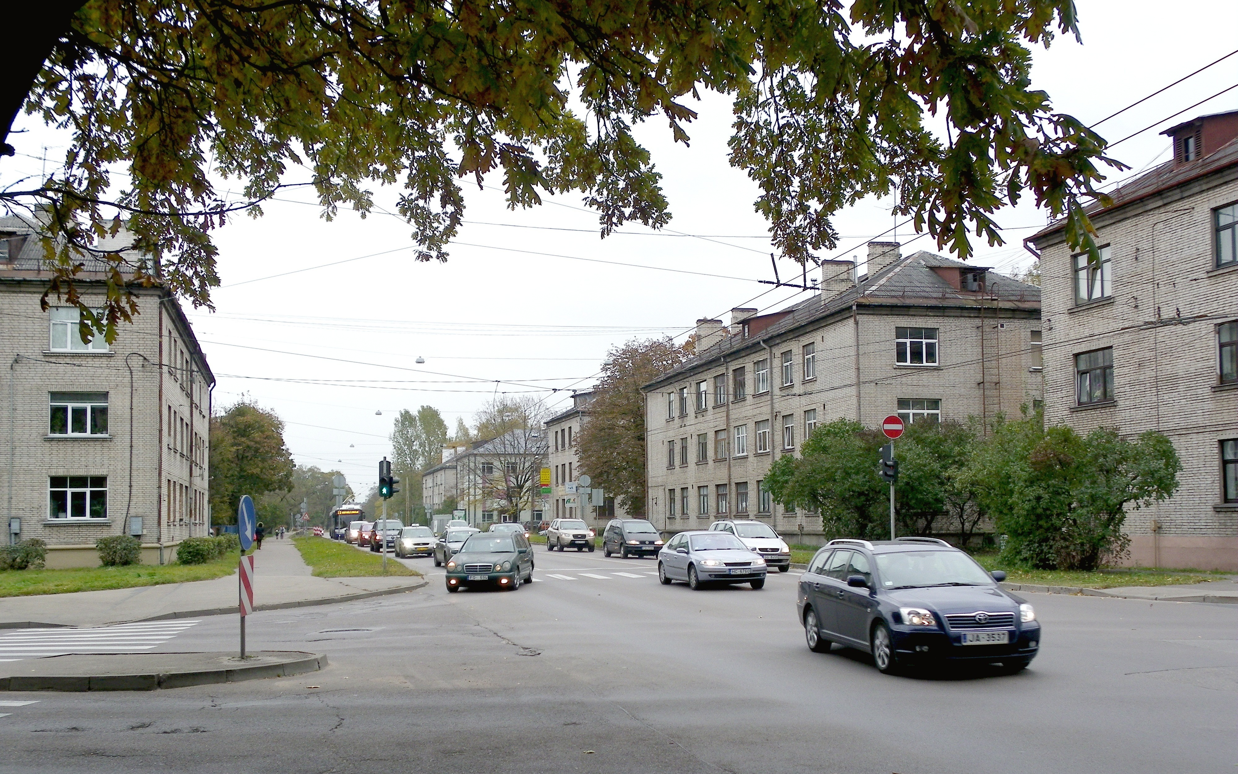 Ieriķu iela no krustojuma ar Gustava Zemgala gatvi